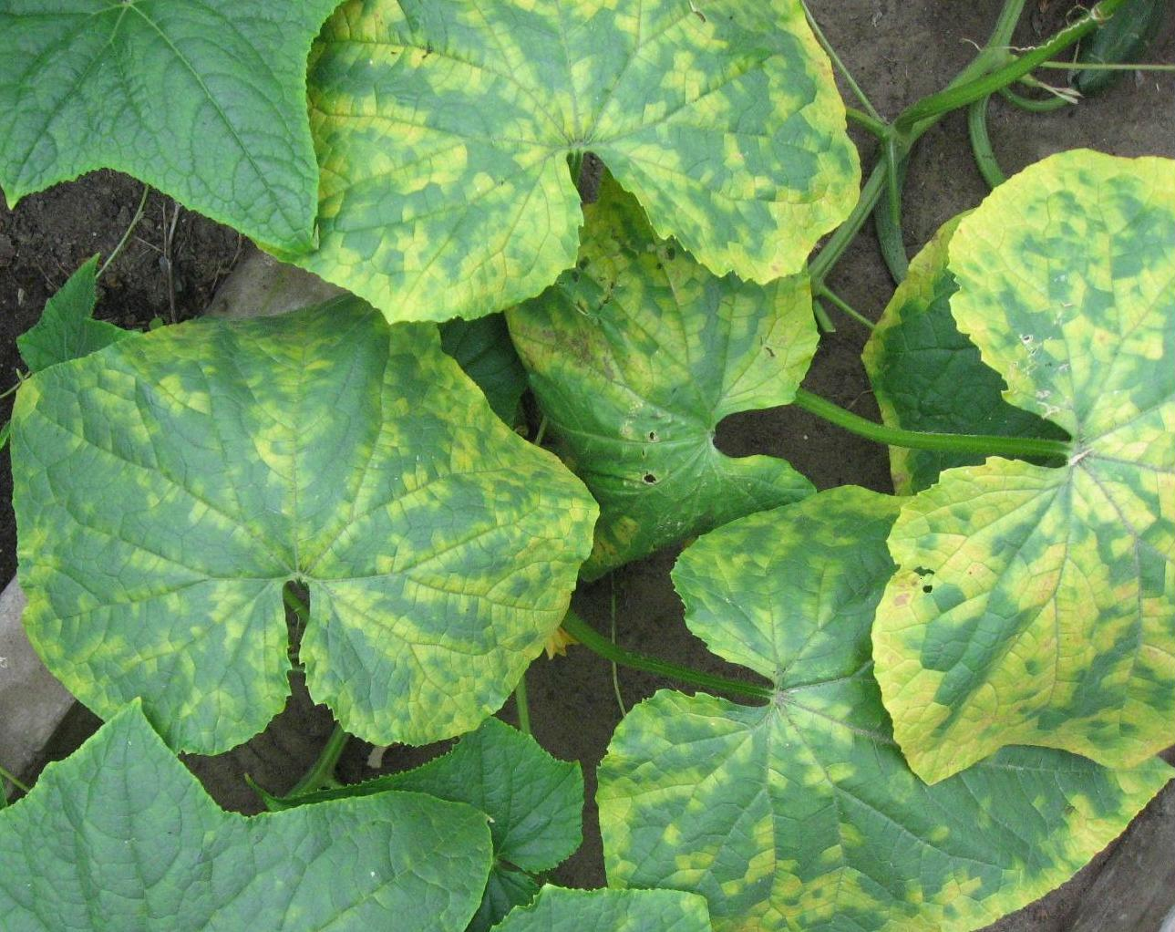 Vom Gurkenmosaikvirus befallene Blätter einer Gurkenpflanze in verschiedenen Stadien.